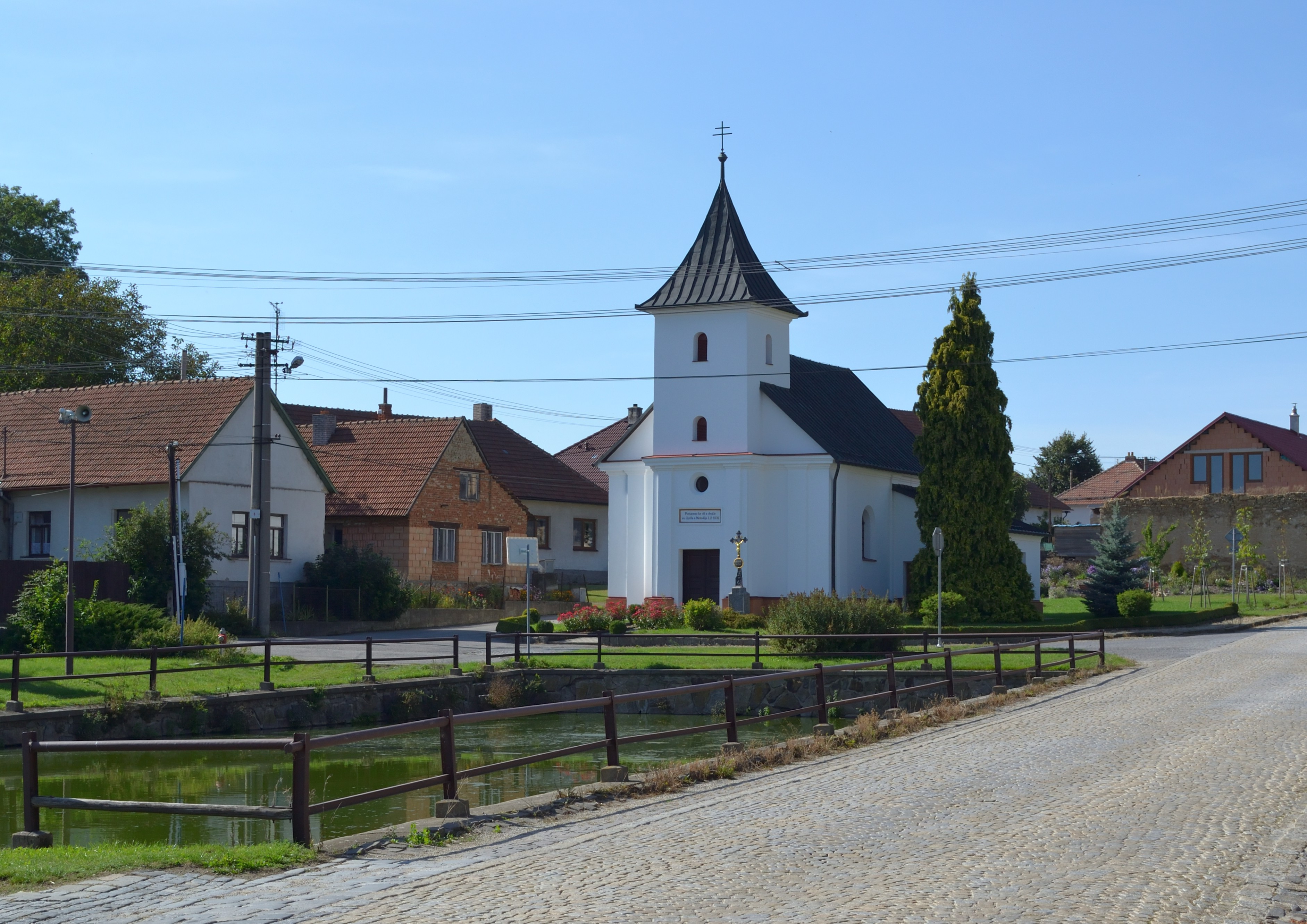 Dobrá Voda (okres Žďár nad Sázavou) - náves s kaplí a nádrží